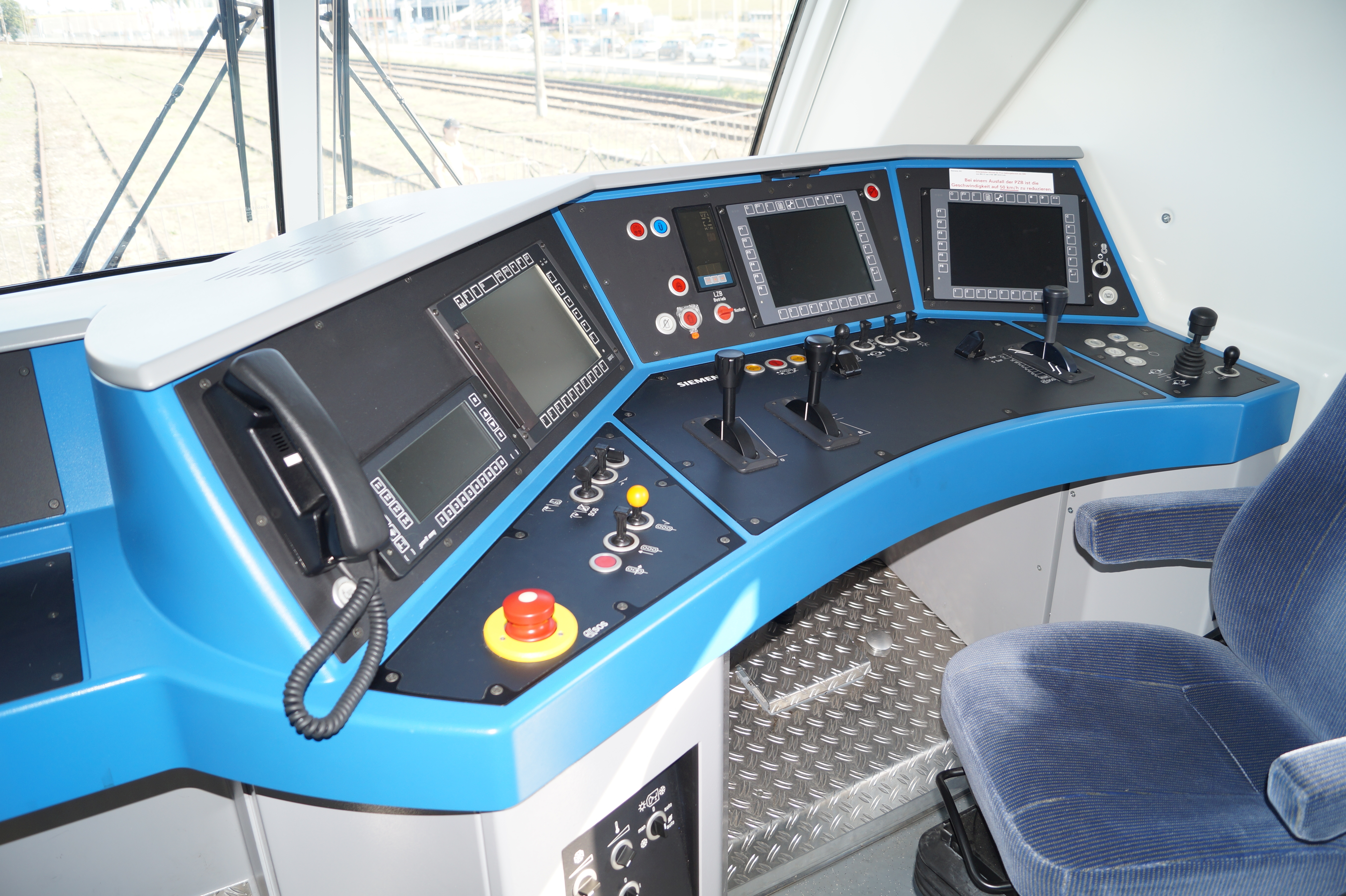 The making of this document was supported by Wikimedia Polska Association, within Wikigrant no. WG 2015-34. Pulpit maszynisty lokomotywy elektrycznej Siemens Vectron wystawianej na Targach Trako 2015